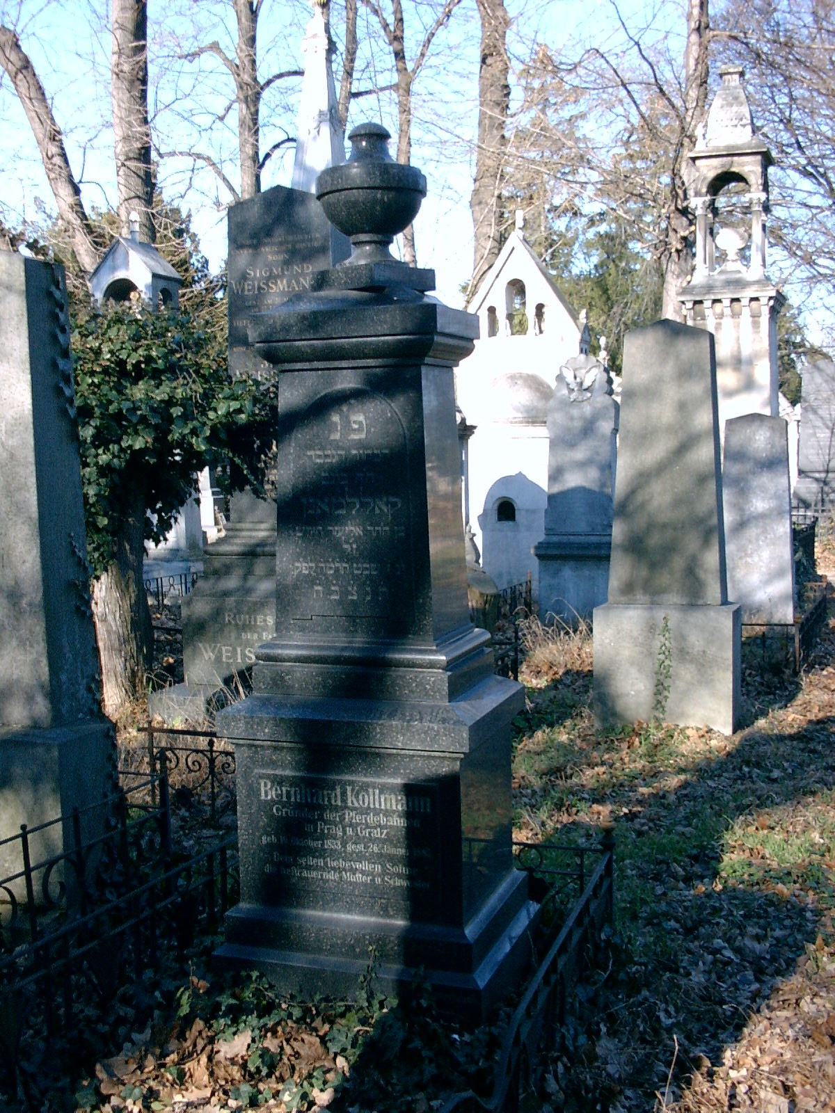 Grabstein von Bernhard Kollmann auf dem Zentralfriedhof Wien, isr. Abteilung 5b/1/4.